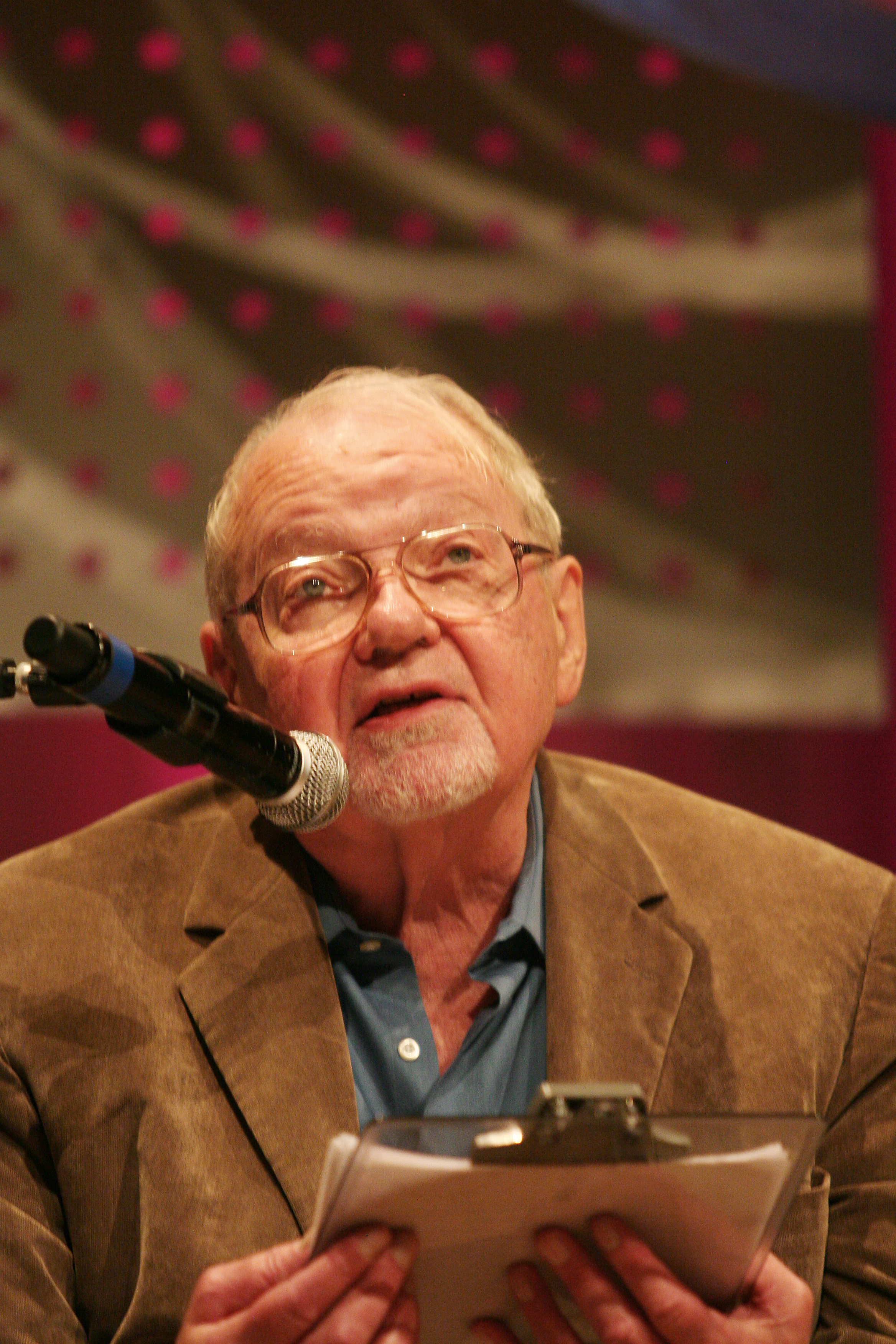 Fredric Jameson no Fronteiras Porto Alegre